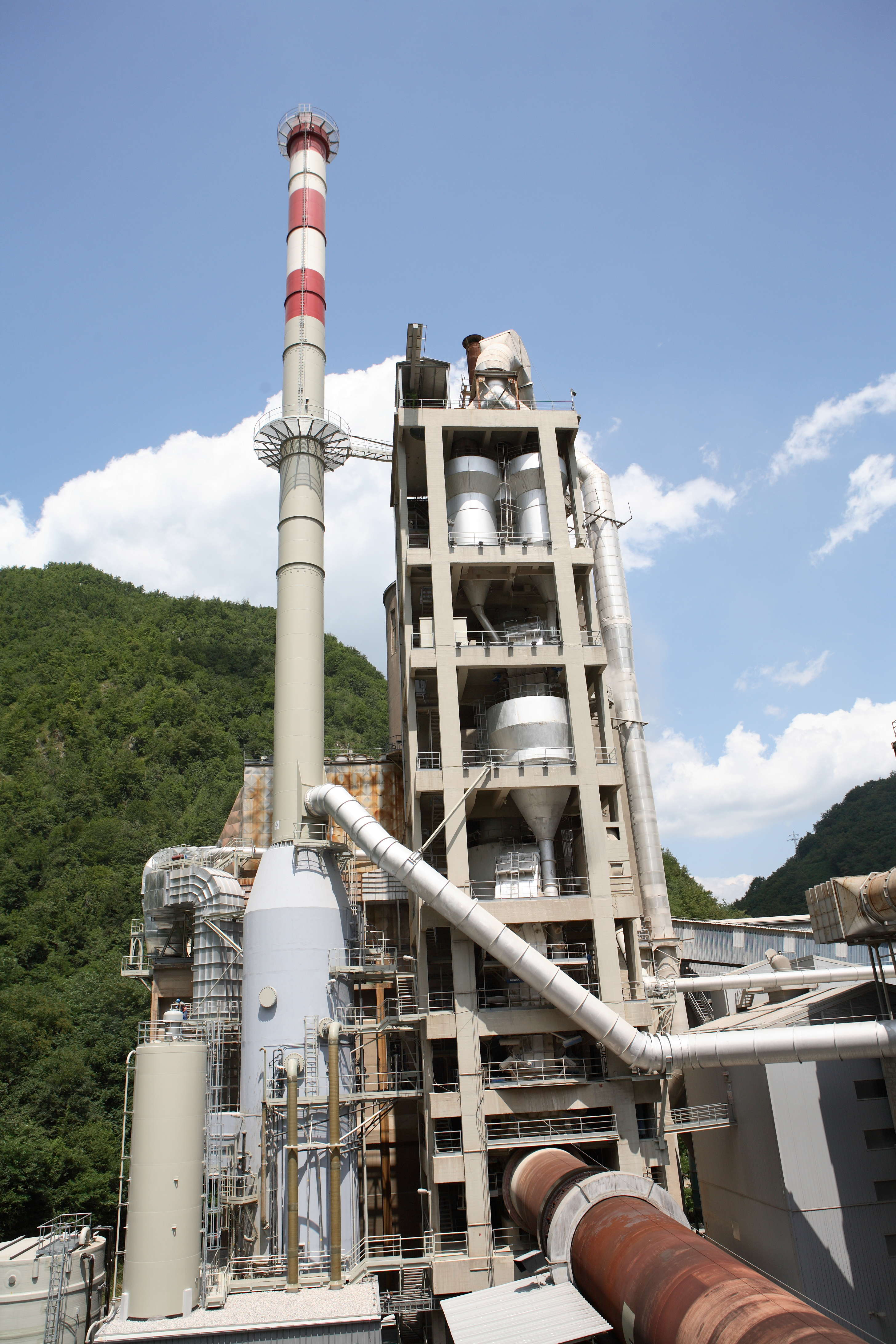 Izmenjevalec toplote v Cementarni Trbovlje